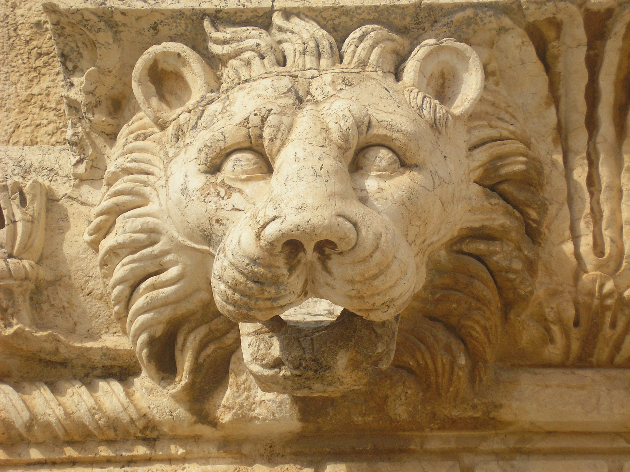 Löwenfigur in Baalbeck (Libanon)